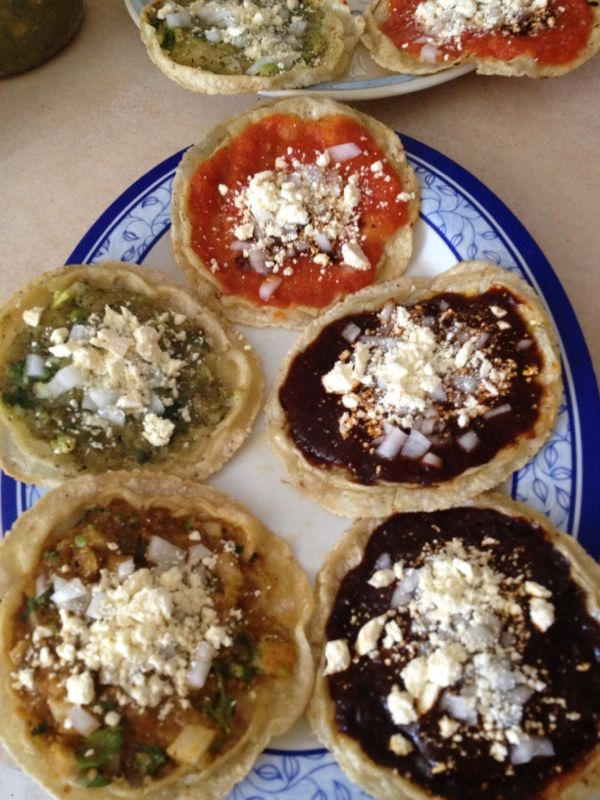 Picada de roja con un poco de chipotle, picada verde, picada ranchera, picada de chipotle y picada de mole